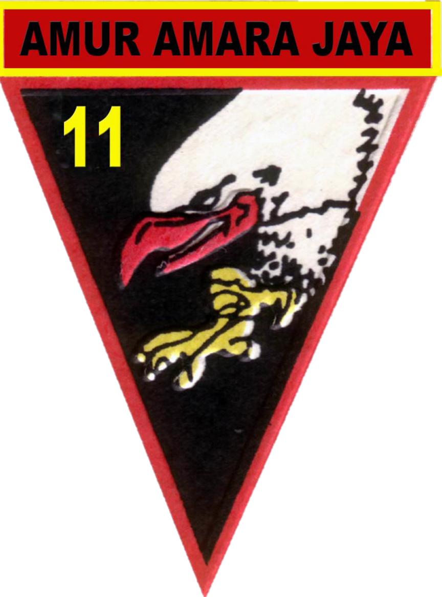 Skadron-11/Serbu Puspenerbad. Amur Amara Jaya